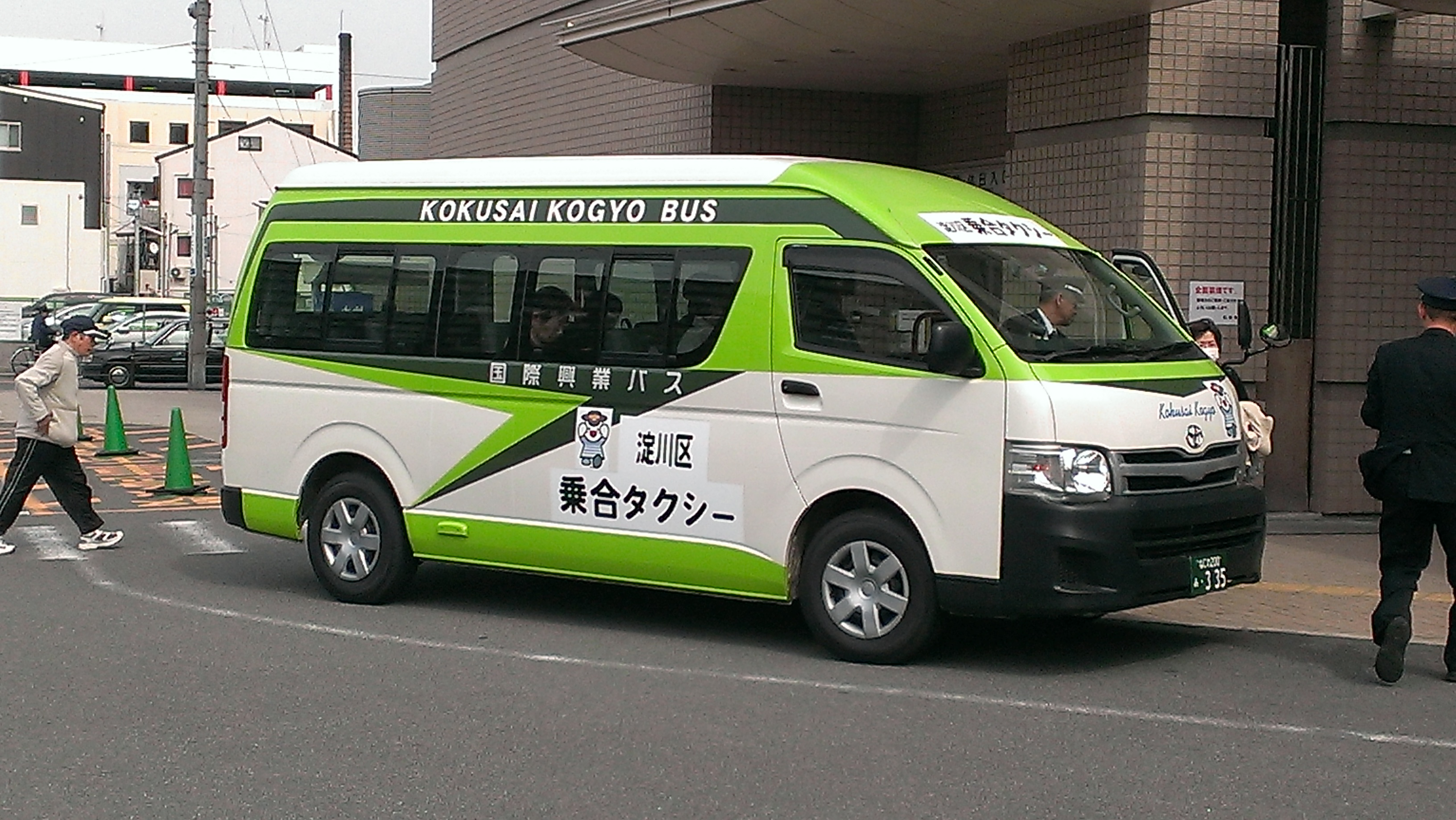 国際興業大阪（国際興業バス） 淀川区乗合タクシー 335号車